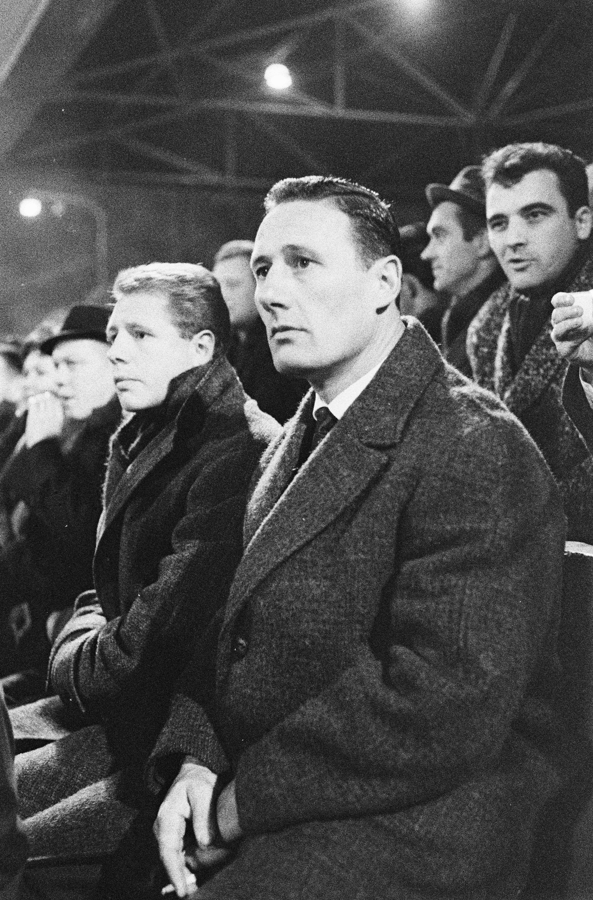 Collectie / Archief : Fotocollectie Anefo Reportage / Serie : [ onbekend ] Beschrijving : PSV tegen Spartak Plovdiv 0-0 voor Europa Cup . Bram Appel op tribune Annotatie : Appel was trainer van PSV. Datum : 27 november 1963 Locatie : Eindhoven Trefwoorden : sport, voetbal, voetbaltrainers Persoonsnaam : Appel, Bram Instellingsnaam : Europa Cup Fotograaf : Pot, Harry / Anefo Auteursrechthebbende : Nationaal Archief Materiaalsoort : Negatief (zwart/wit) Nummer archiefinventaris : bekijk toegang 2.24.01.05 Bestanddeelnummer : 915-7864